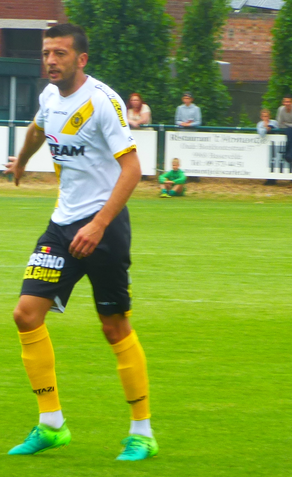 Marko Mirić